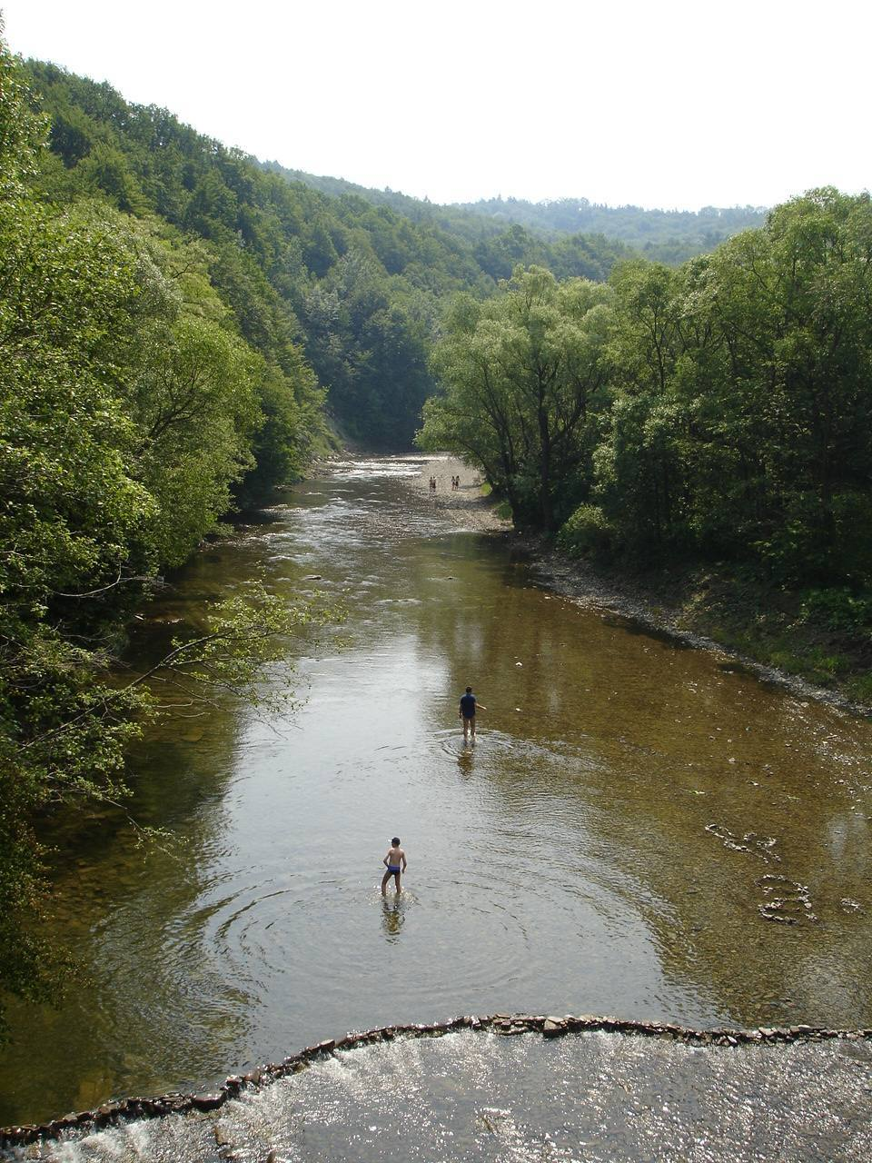 rzeka Wisłok widok z mostu w miejscowości Pastwiska, 2006 czerwiec